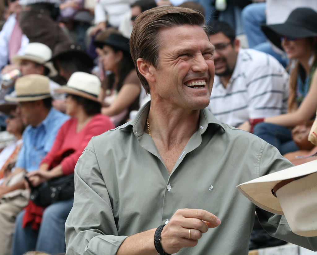 Espartaco en 2008